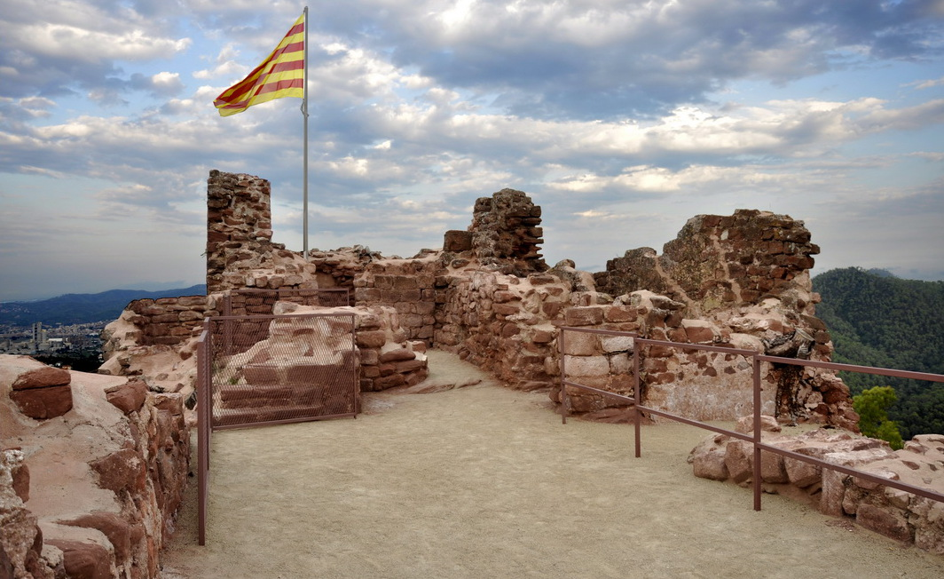 Castell de Cervelló